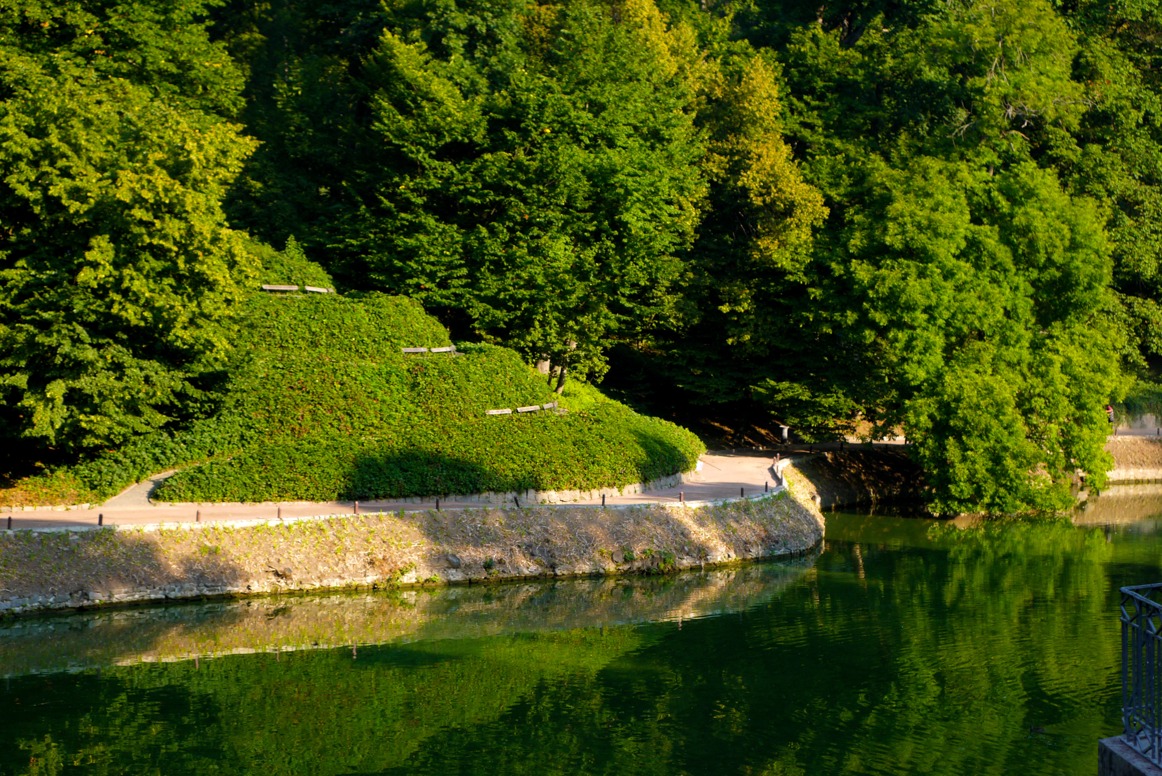 3.5. Тераса Бельв’ю (Гвинтова гірка), Умань, вул. Садова, 55 (парк «Софіївка»)